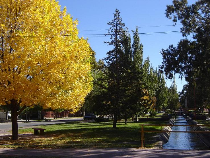 Canal de riego parquizado que atraviesa la ciudad de General Roca, Río Negro, Argentina.